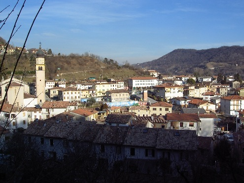 Il paese di Tarzo, ripreso dalle colline limitrofi